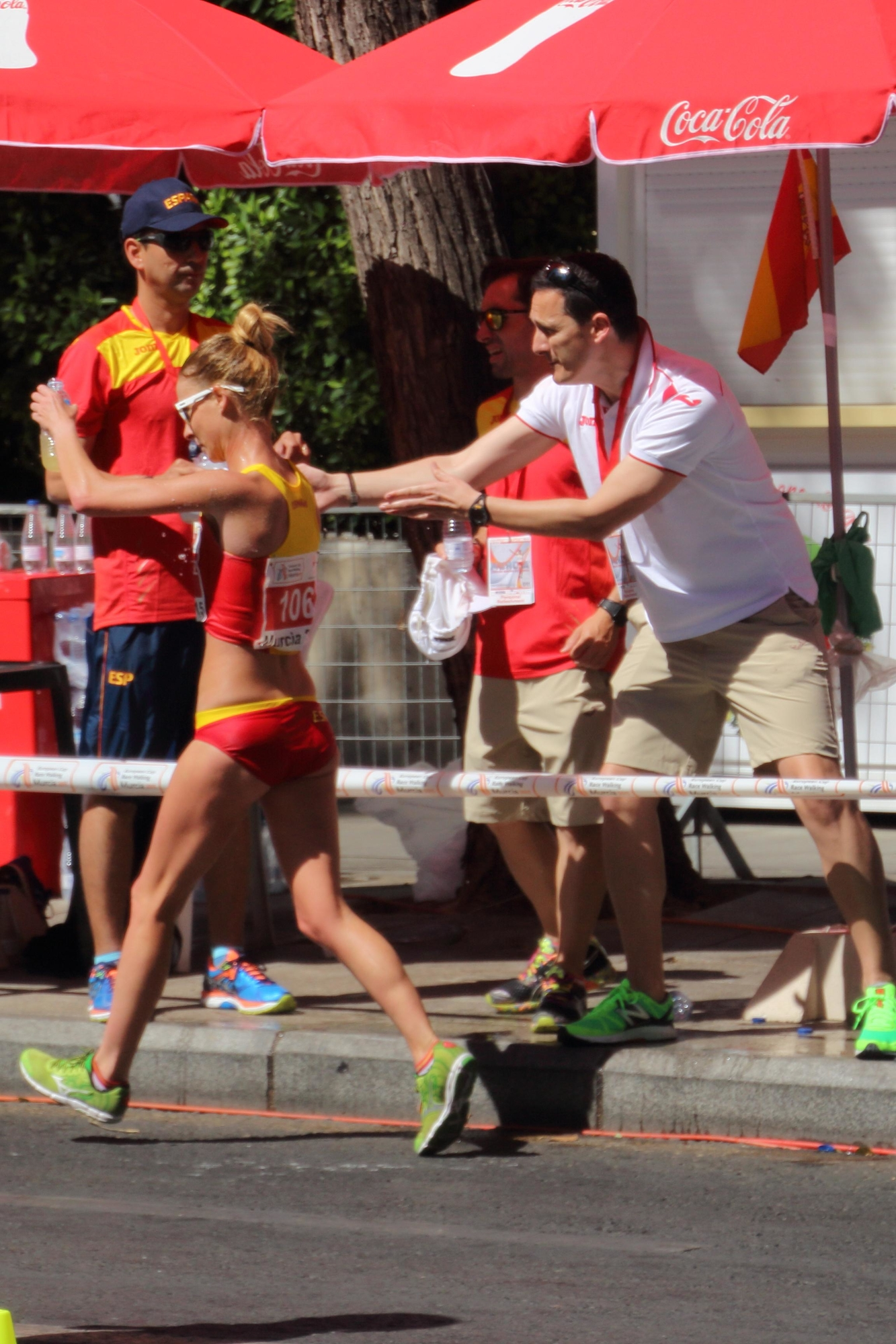 Santiago Pérez avituallando a Raquel González en la Copa de Europa de Marcha Atlética de 2015 celebrada en Murcia, España.